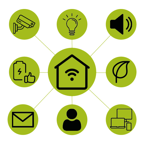 Hausautomation - Smart Home - Connected Home